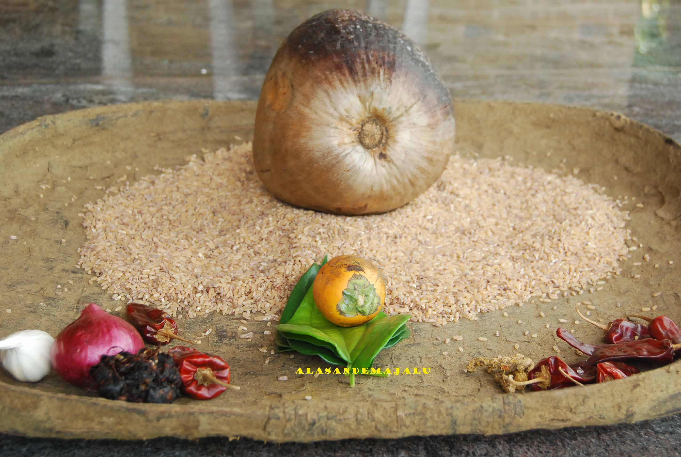 ಕನ್ನಡ: ಕೆಡ್ಡಸ ಹಬ್ಬದ ಒಂದು ವಾರದ ಮೊದಲು ಆ ಗ್ರಾಮದ ಭೂತ ನಲಿಕೆ ಜನ, ಪಾಣರ ಜನ ಕೆಡ್ಡಸದ ಓಲೆ ತೆಗೆದುಕೊಂಡು ಬರುವಾಗ ಕೊಡುವ ಸಾಮಾನು